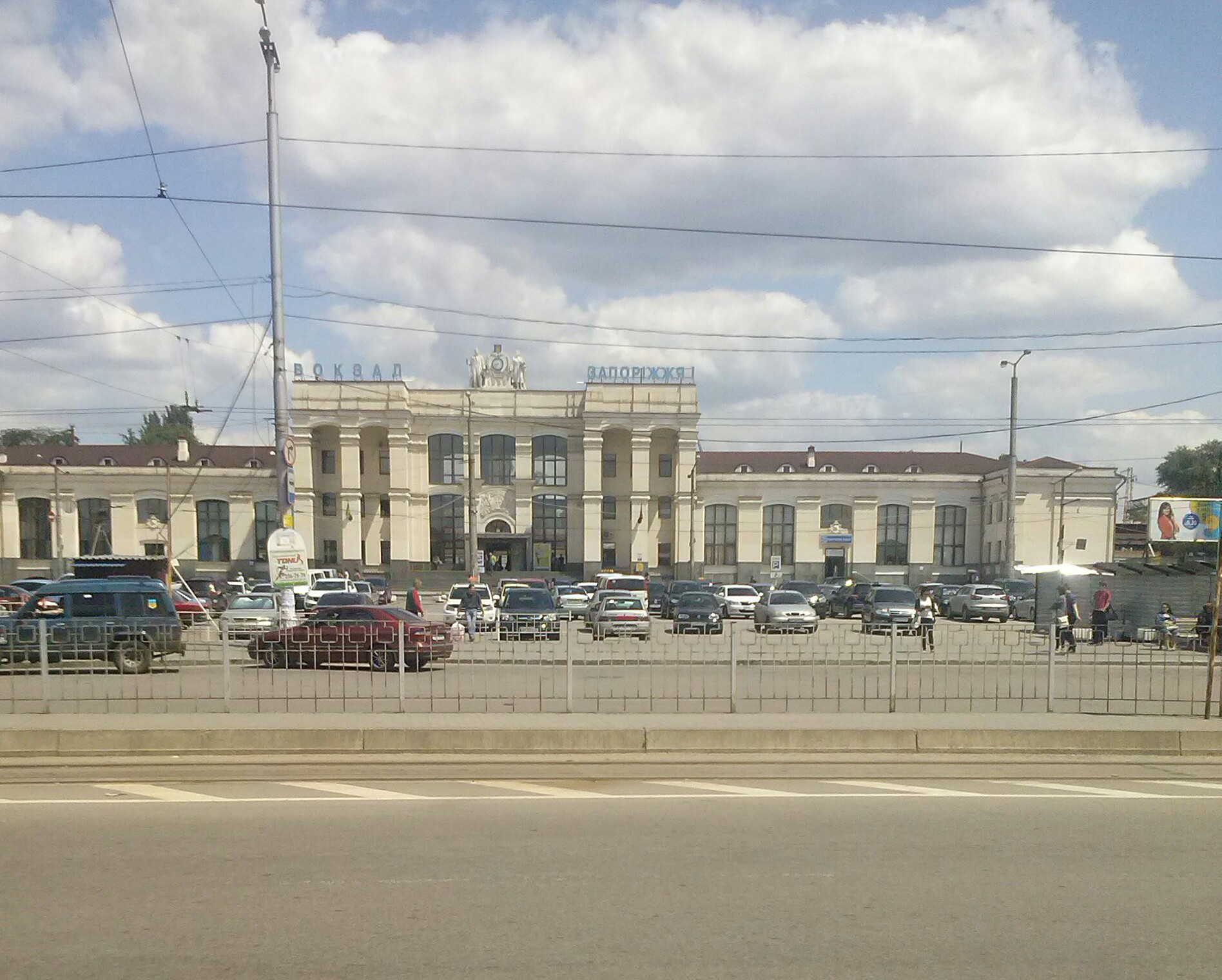 Залізничний вокзал Запоріжжя-1. Привокзальна площа